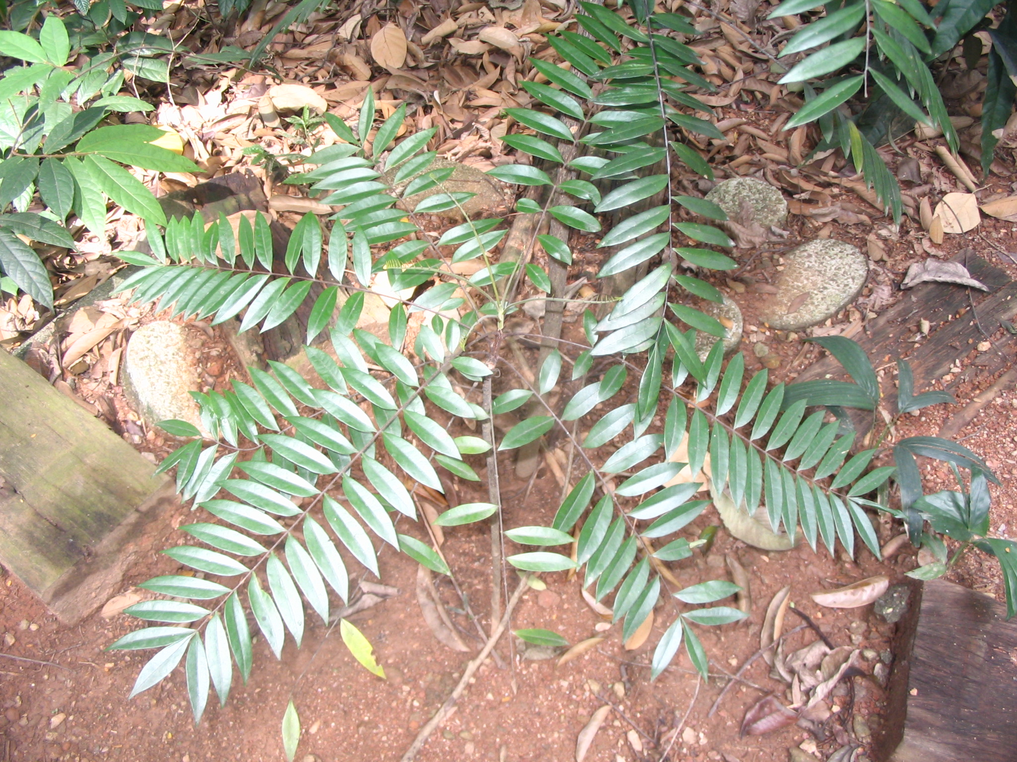 Eurycoma longifolia - Bukit nanas Forest Reserve - Kuala Lumpur- malaisie